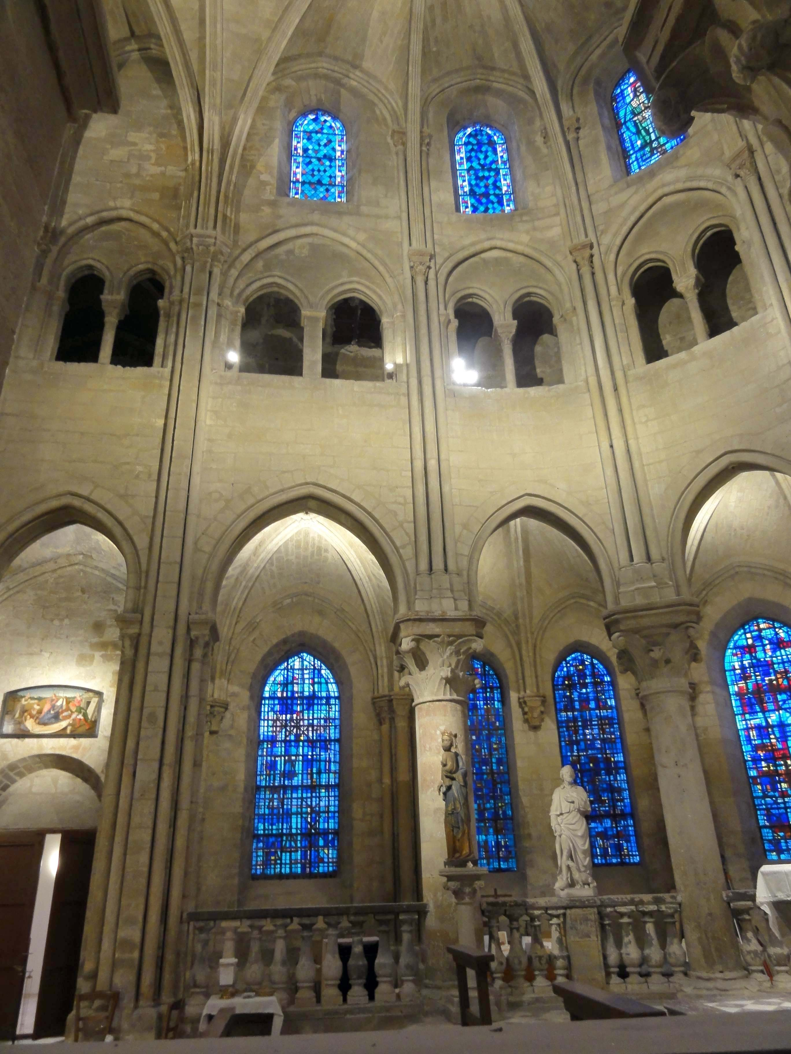 Intérieur de l'église - voir titre.